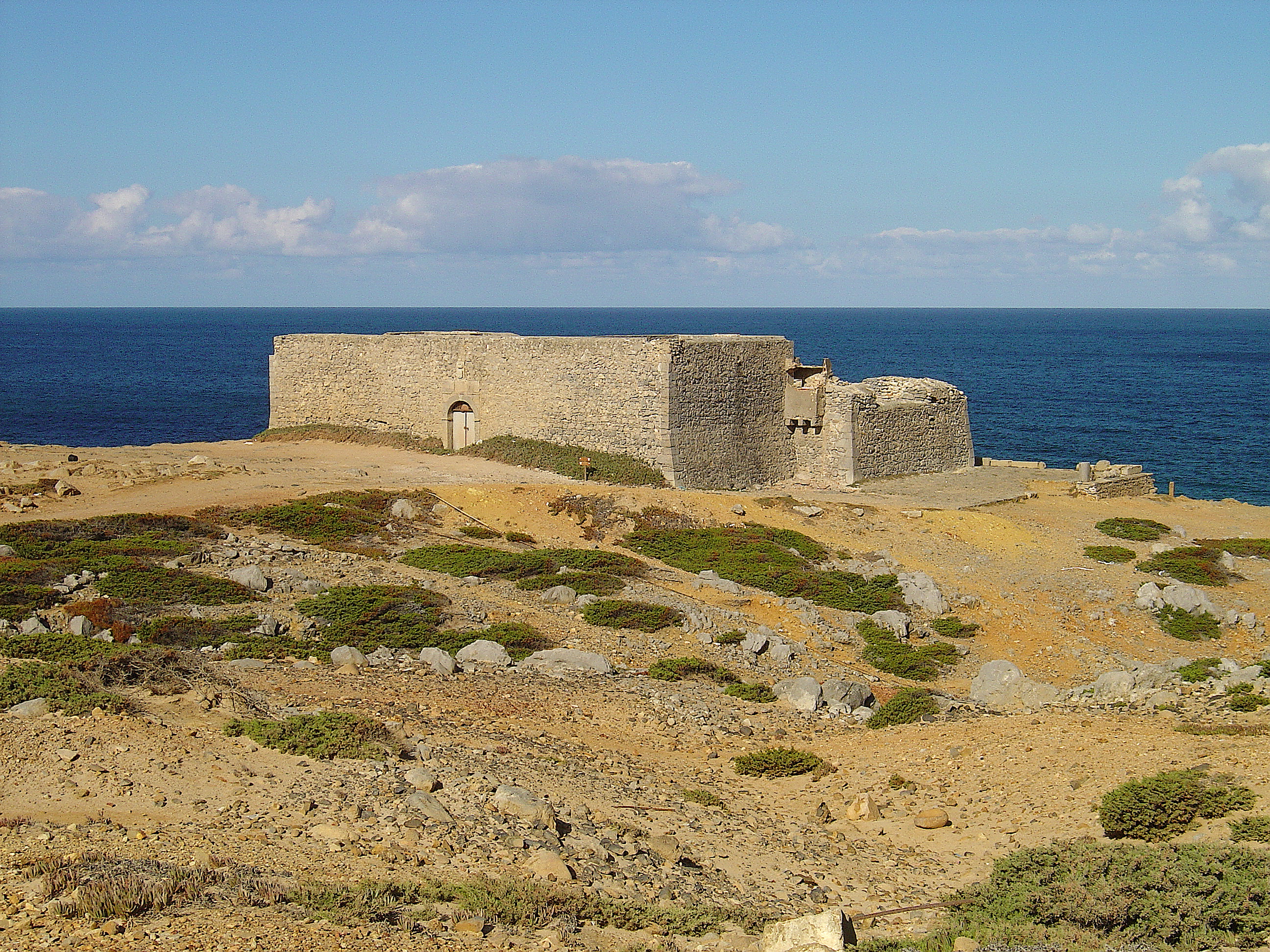 Forte do Guincho ( Portugal )